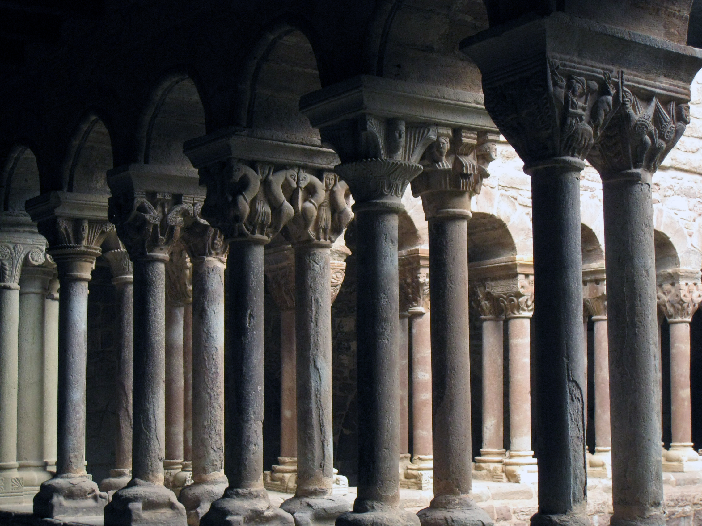 Santa Maria de l'Estany (Bages), detall del claustre romànic